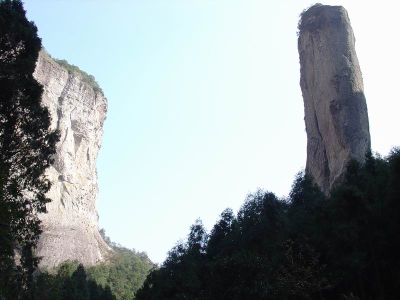 雁荡山